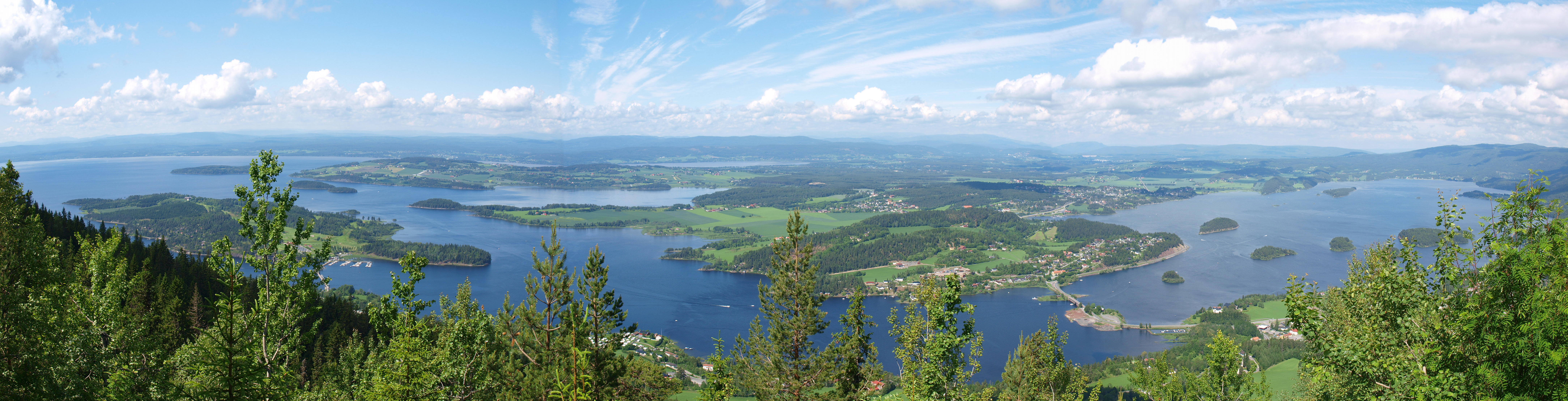 Kongens utsikt, et utsiktspunkt i Hole kommune i Buskerud. Utsikt over bl.a.Tyrifjorden, Storøya, Røyse, Sundøya, Steinsfjorden og Åsa helt til høyre.